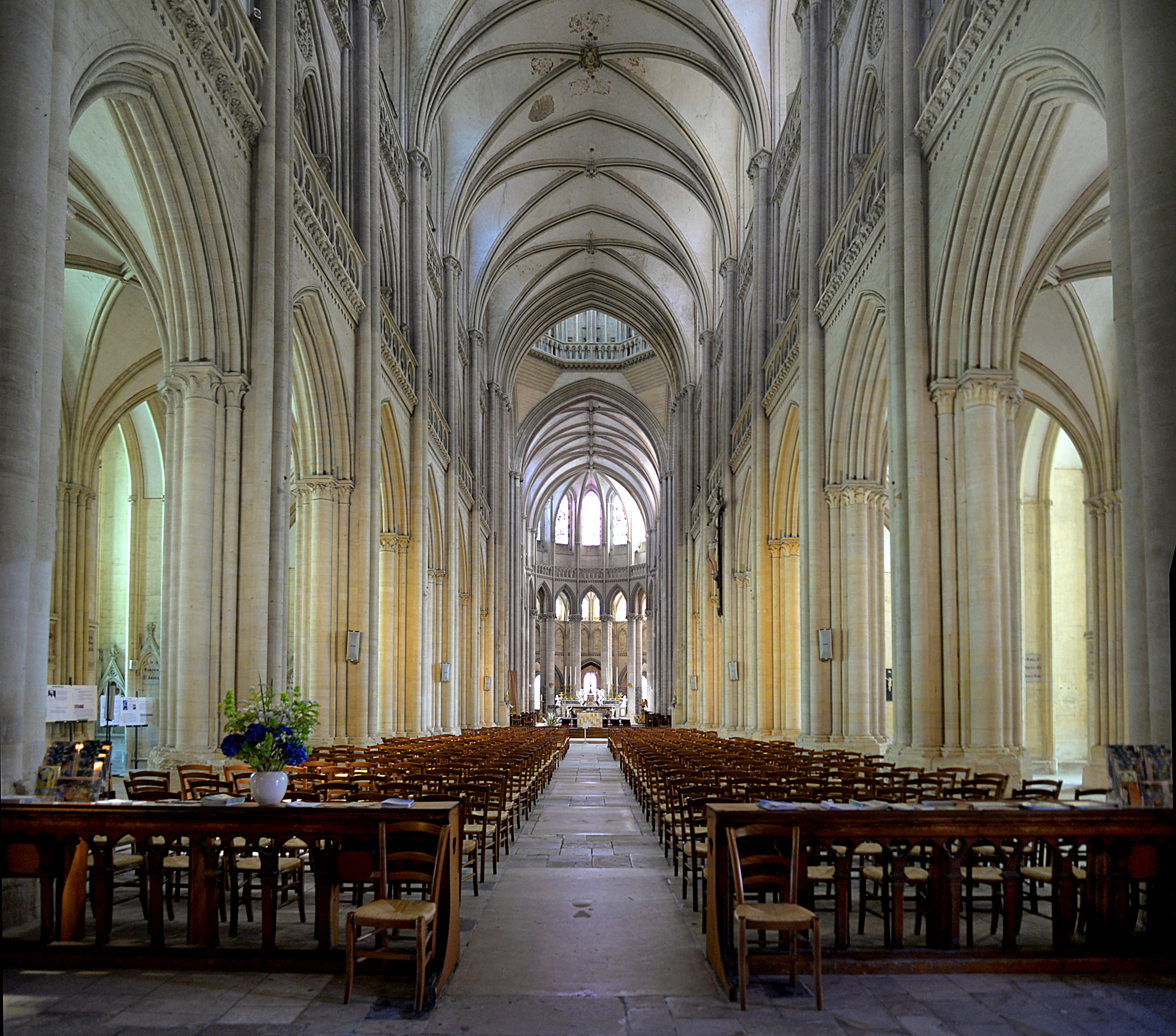 Coutances (Manche)